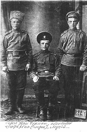 Командир Вороньківської сотні армії УНР (у 1919 році) Іван Черпак з побратимами під час служби у царському війську.